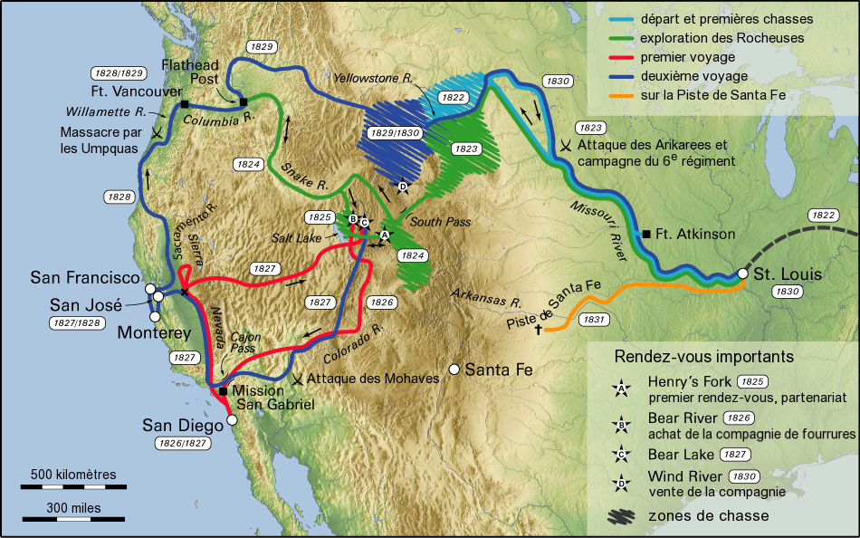 Version française de l'exploration de l'Ouest américain par Jedediah Smith